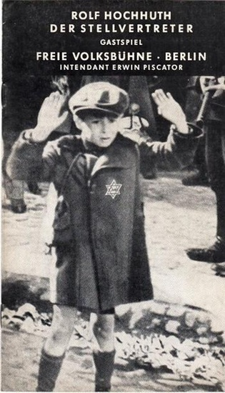 Rolf Hochhuth - Der Stellvertreter. Programmheft der Freien Volksbühne Berlin, 1963. Aus dem Inhalt: Insz.: Erwin Piscator, Bühne und Kostüme: Leo Kerz, mit u.a.: Günther Tabor, Hans-Albert Martens, Karl John, Otto Czarski, Peter Lehmbrock, Malte Jaeger, Hans. W. Hamacher, Waltraud Mohr